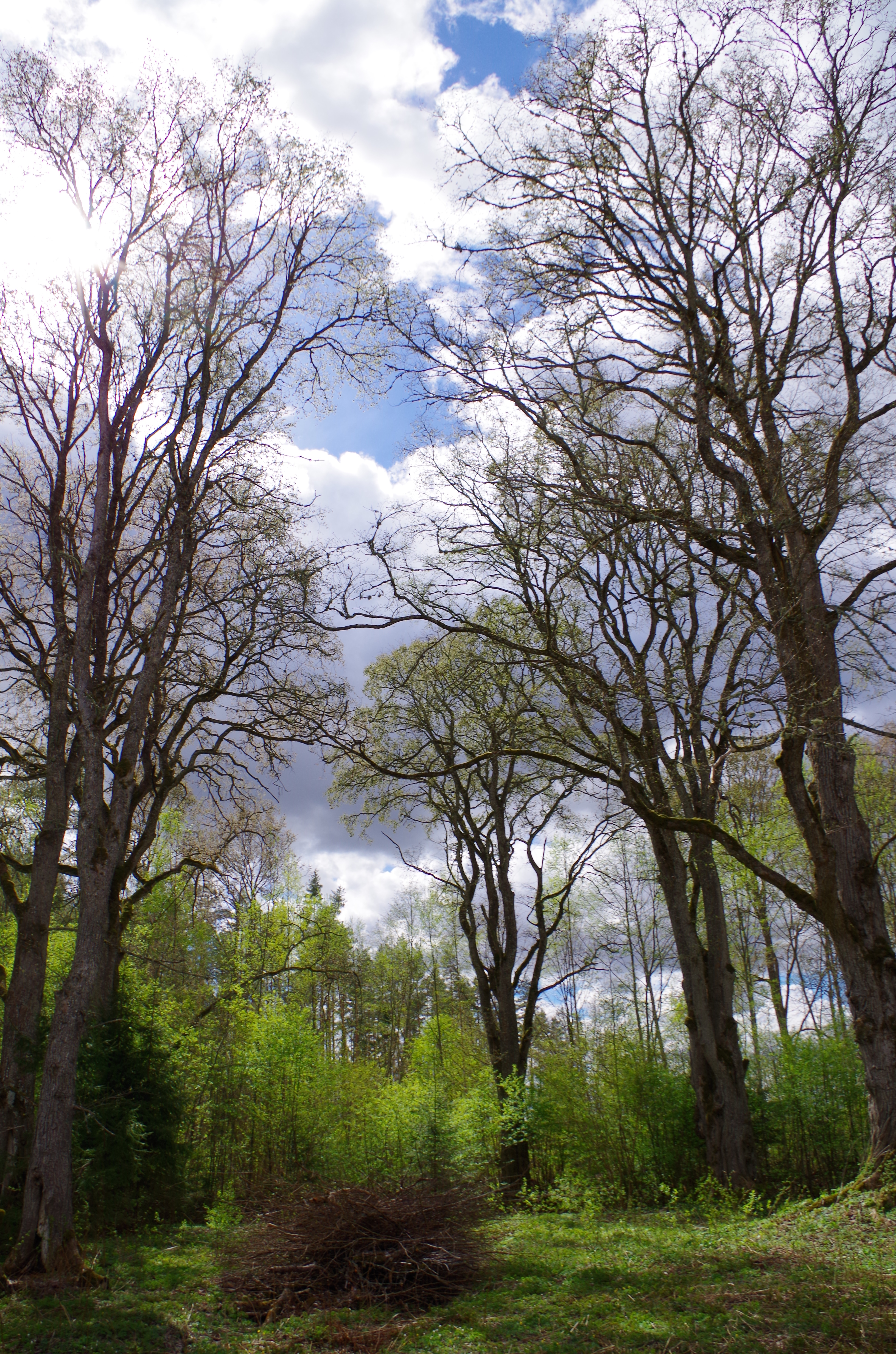 Kiigeoru hiiesalu